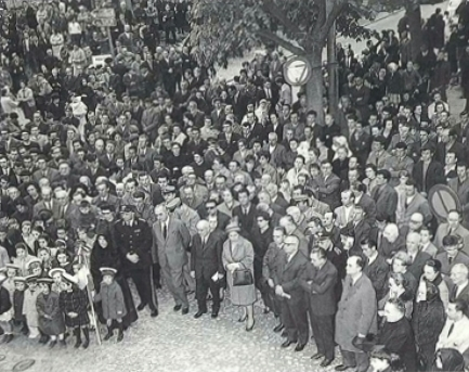 Morbegno - 1965 - Inaugurazione della lapide commemorativa nel decennale della morte dell'Ing. Enea Mattei nella Piazza a lui dedicata.